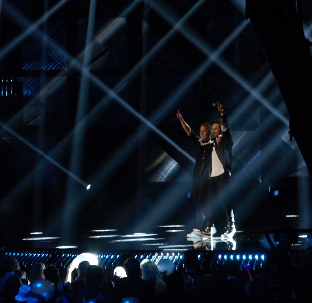 Szwedzcy piosenkarze Mattias Andréasson i Albin Johnsén podczas 1. półfinału "Melodifestivalen 2016".